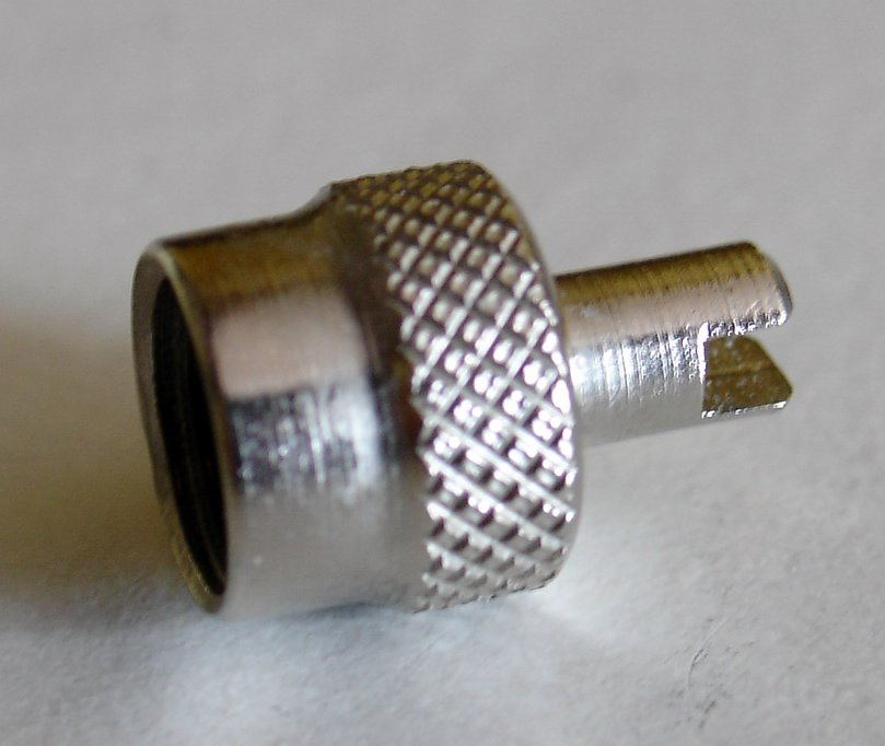 Kaperka - narzędzie do wkręcania/wykręcania wentyli